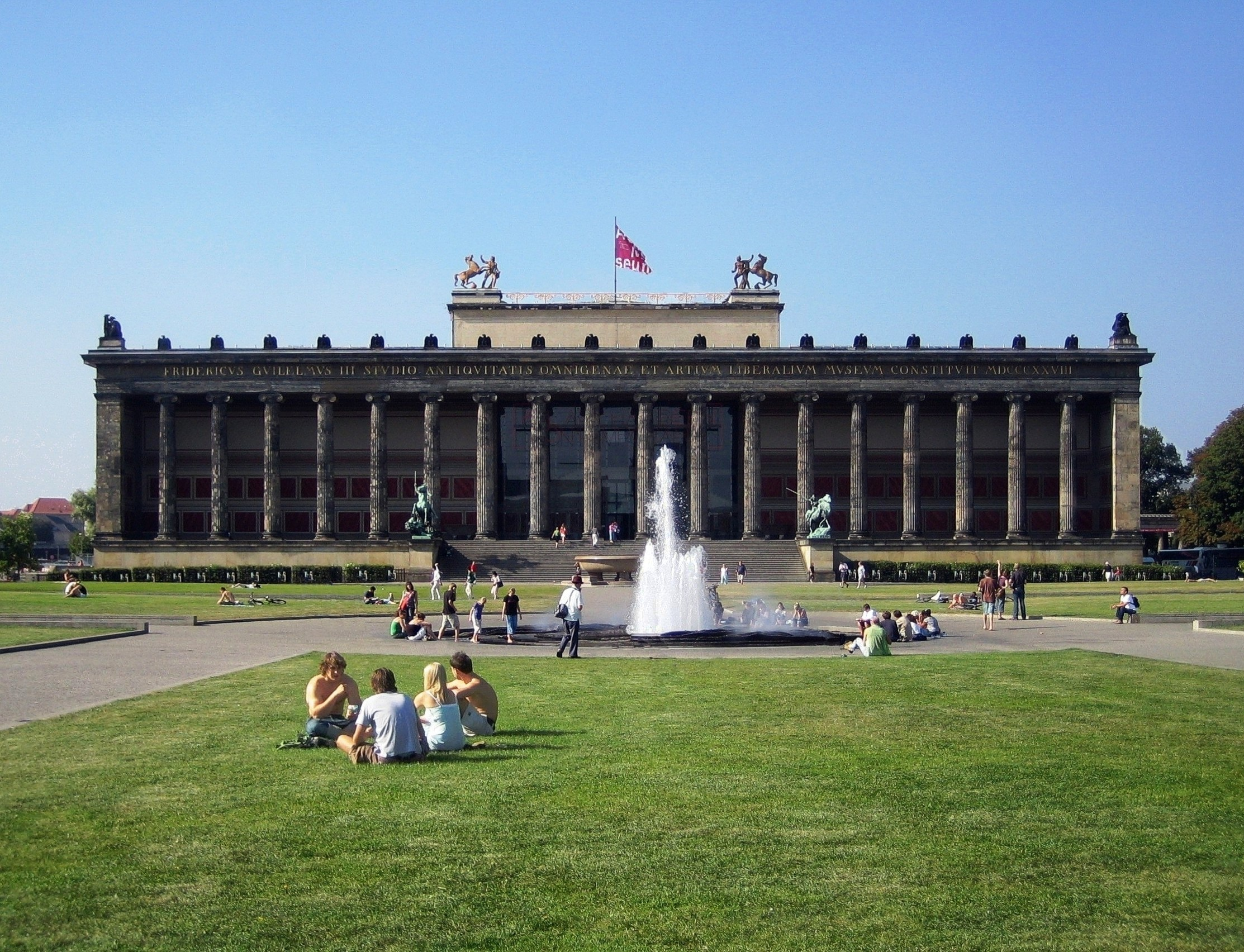 Berlin-Mitte, Am Lustgarten. Das Alte Museum.